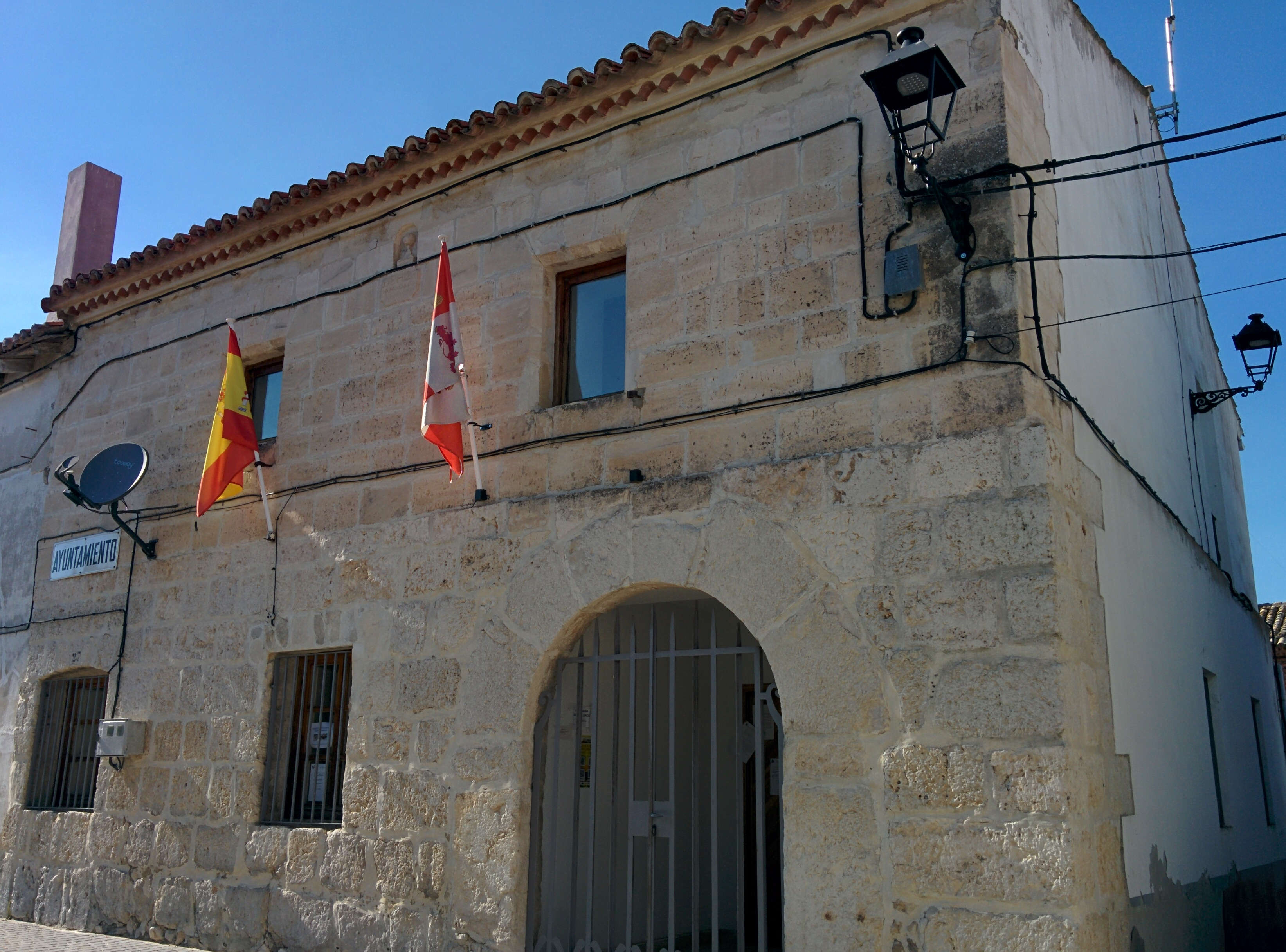 Casa consistorial de Valle de Cerrato (Palencia, España).